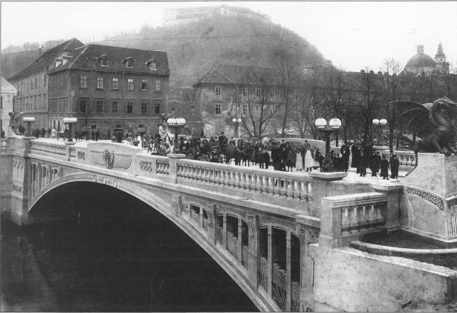 Cesarja Franca Jožefa - Jubilejni most (sedaj Zmajski most)